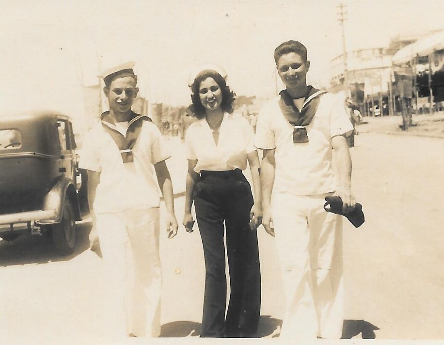 חניכי בית הספר הימי של זבולון אגודת יורדי ים מלווים חברה בביקור בתל אביב מאי 1940